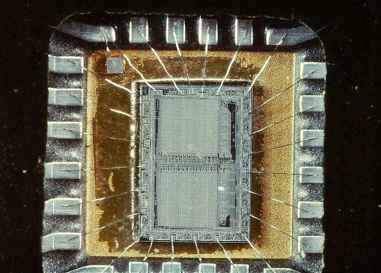 Original image description from the Deutsche FotothekElektronikbausteine